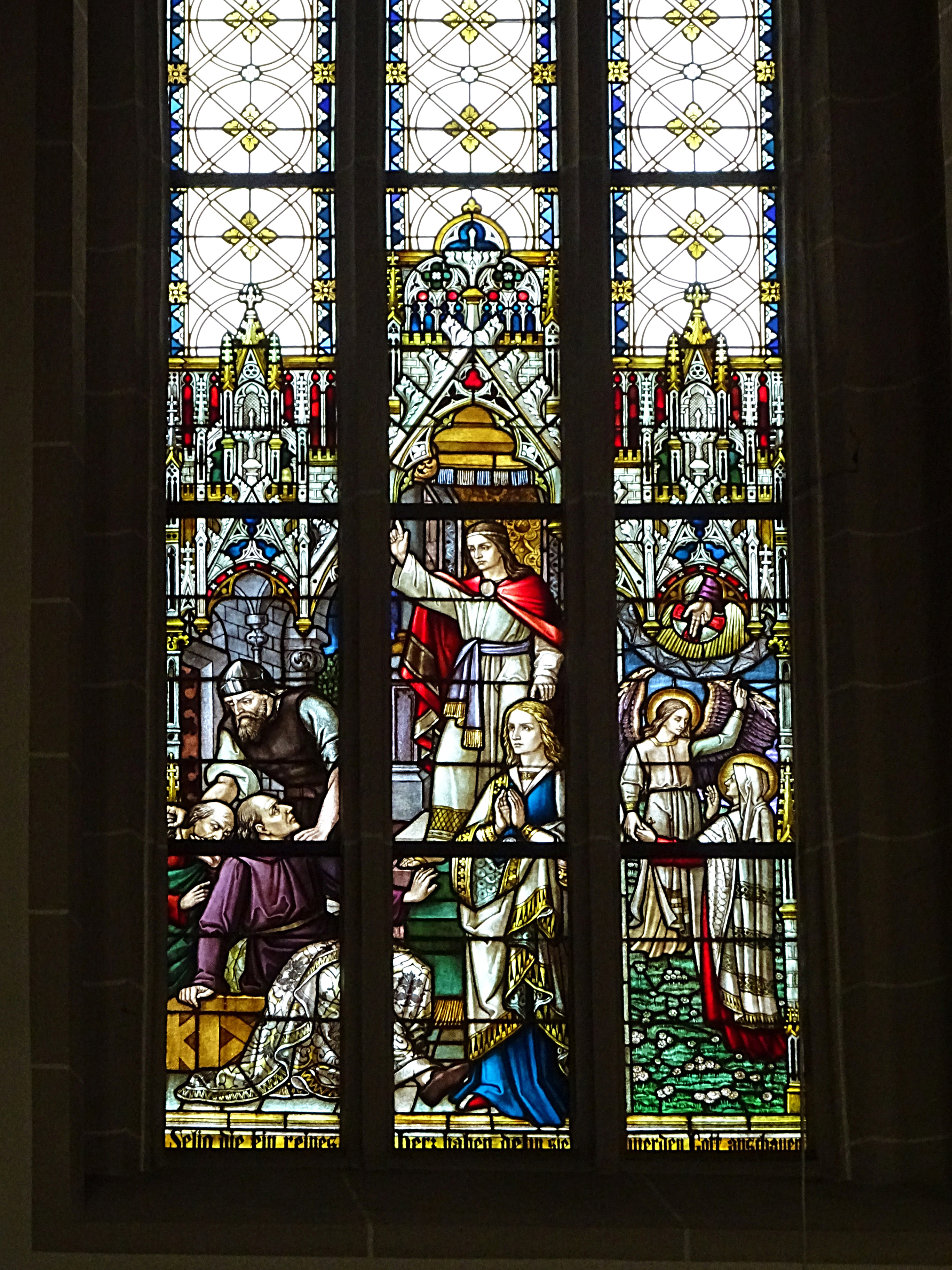 Buntglasfenster in der Pfarrkirche St. Gertrud (Dingelstädt) 6. Selig, die reinen Herzens sind, denn sie werden Gott schauen / Die Rettung der Susanna durch Daniel